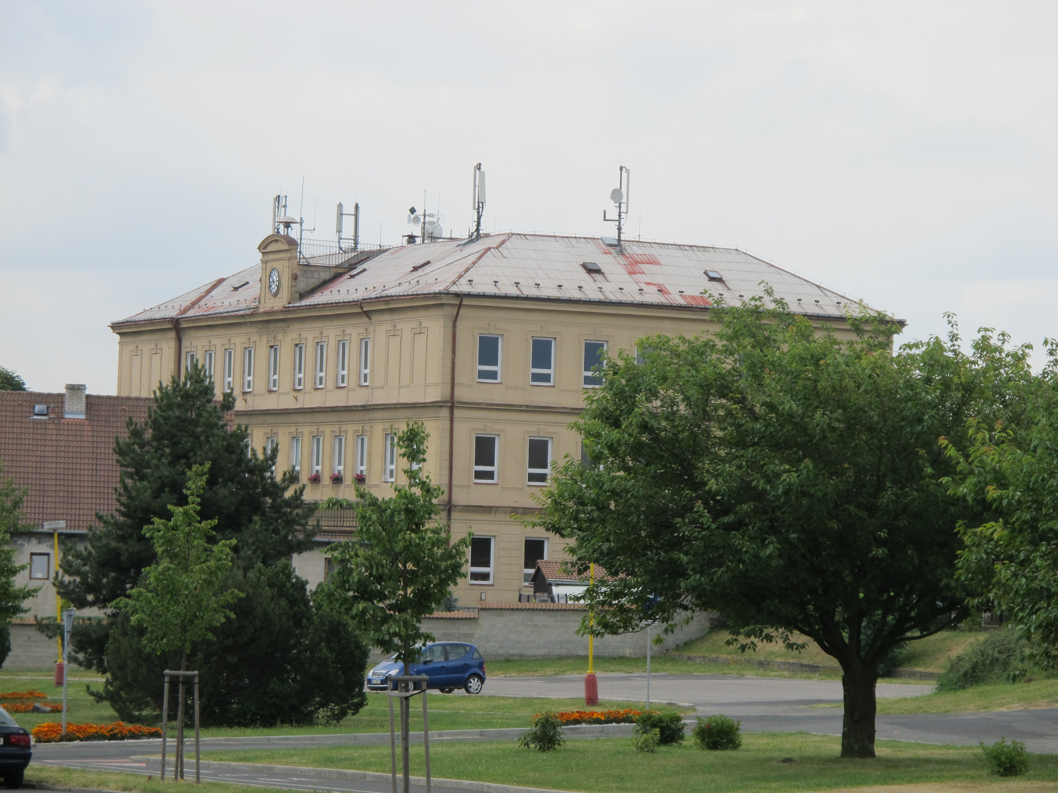 Lom - radnice